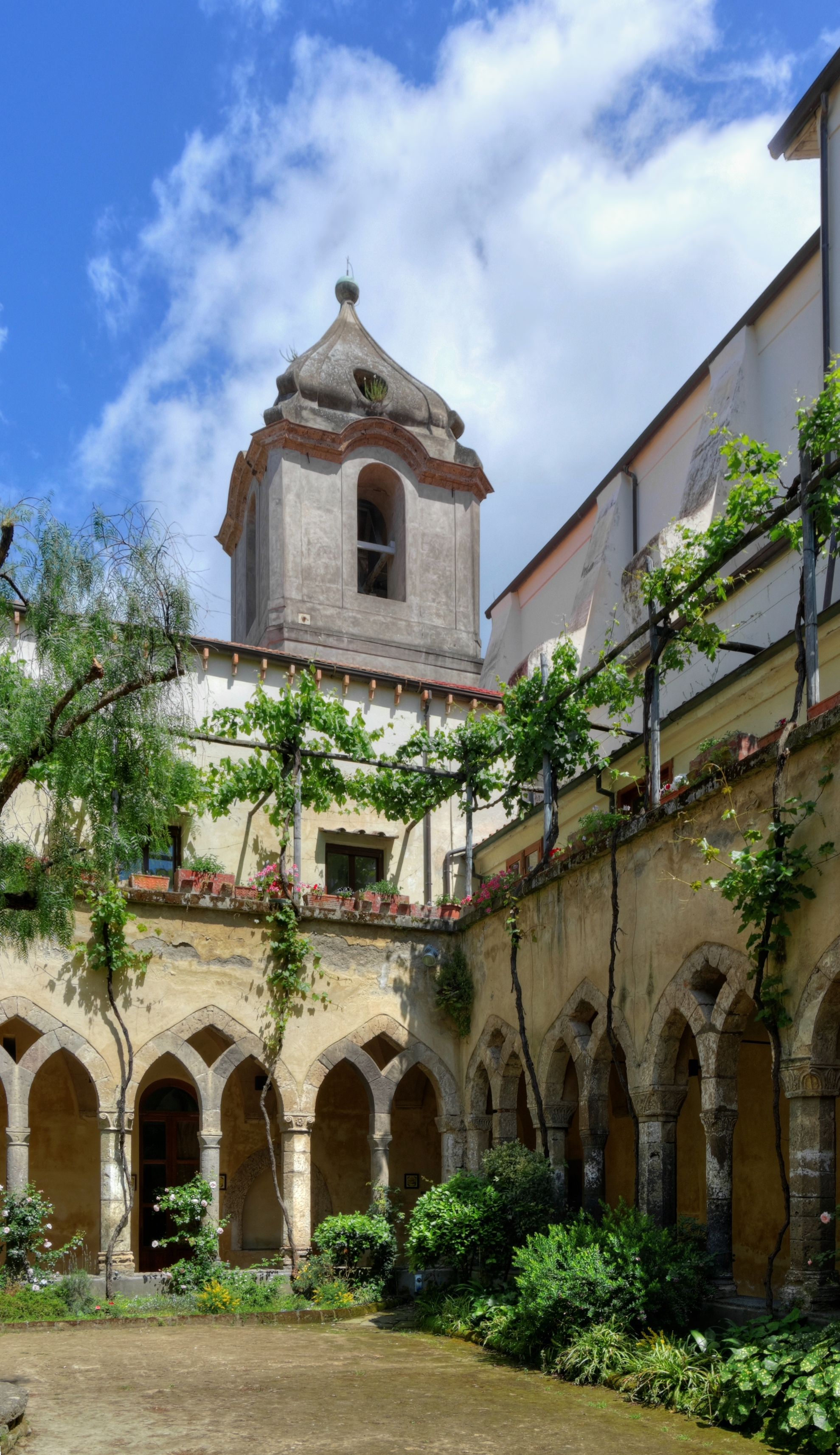 Sorrento, Chiostro di San Francesco